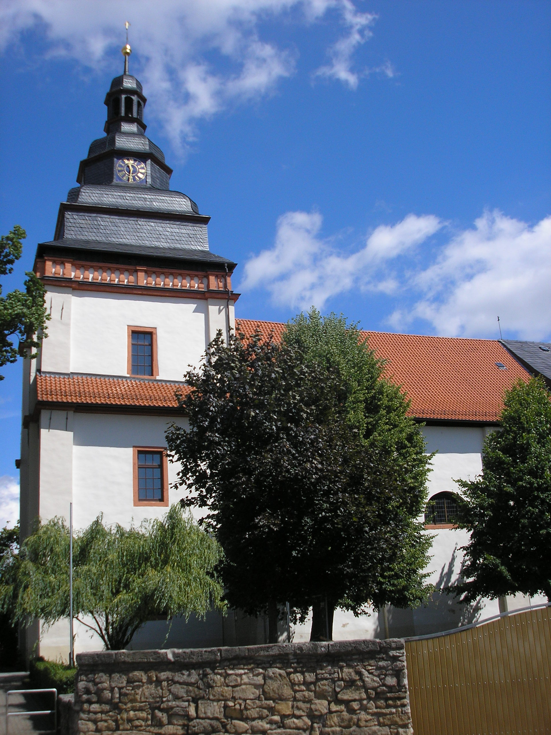 Die Kirche in Breitenworbis (Thüringen) im Eichsfeld.